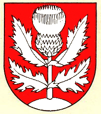 Wappen von Montaubion-Chardonney Kanton Waadt Schweiz